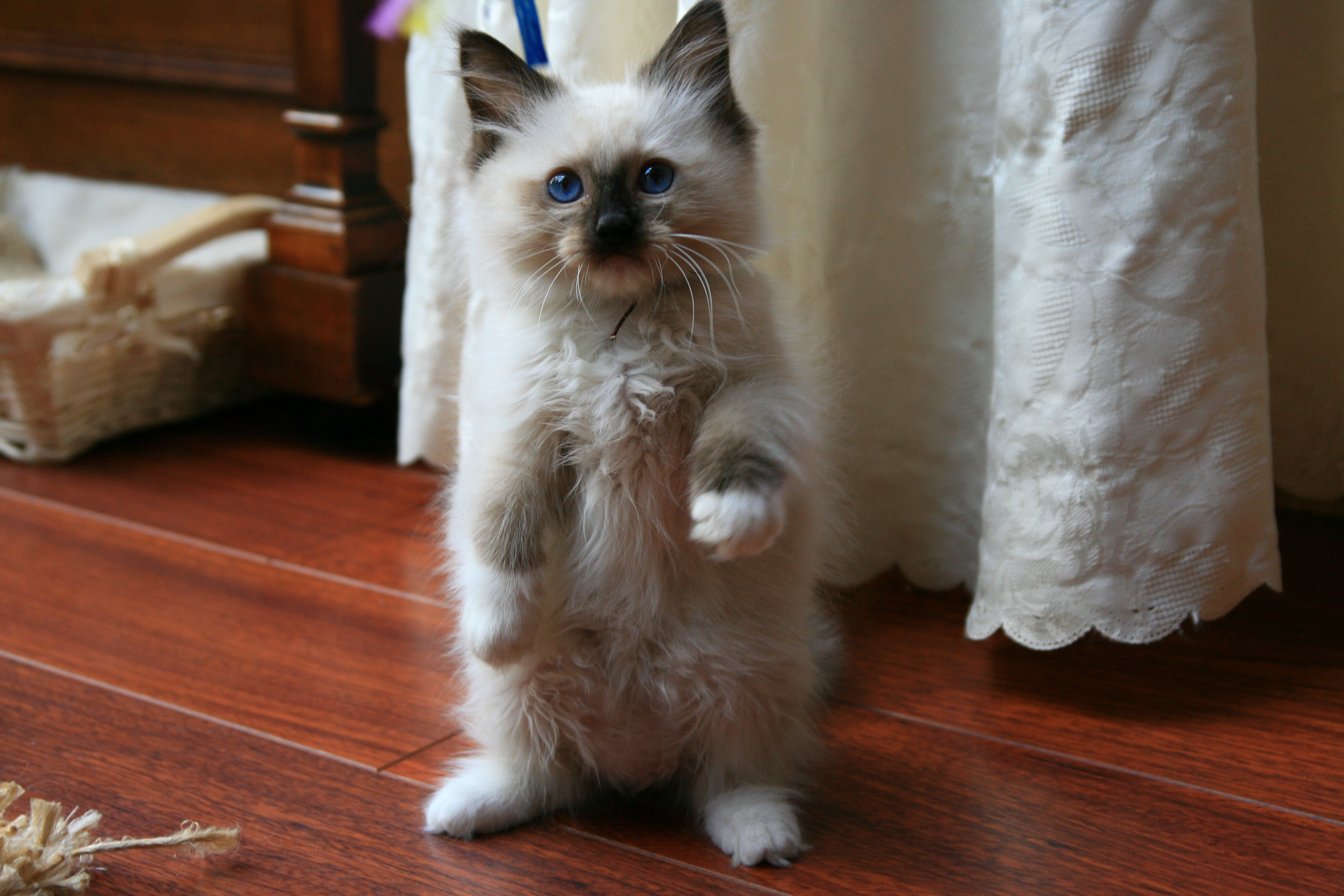 12 weken oude seal mitted ragdoll